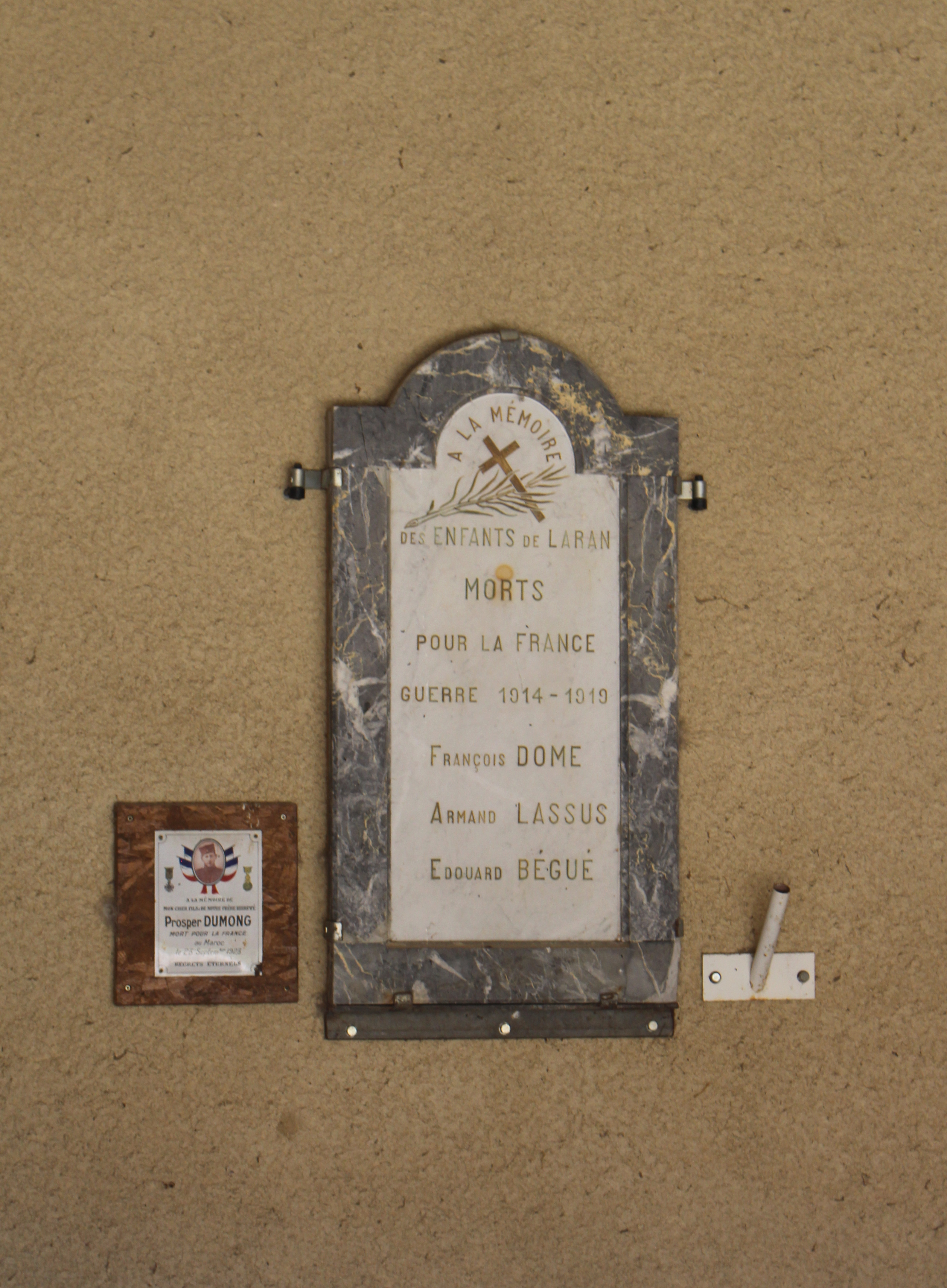 Monument aux morts de Laran (Hautes-Pyrénées)